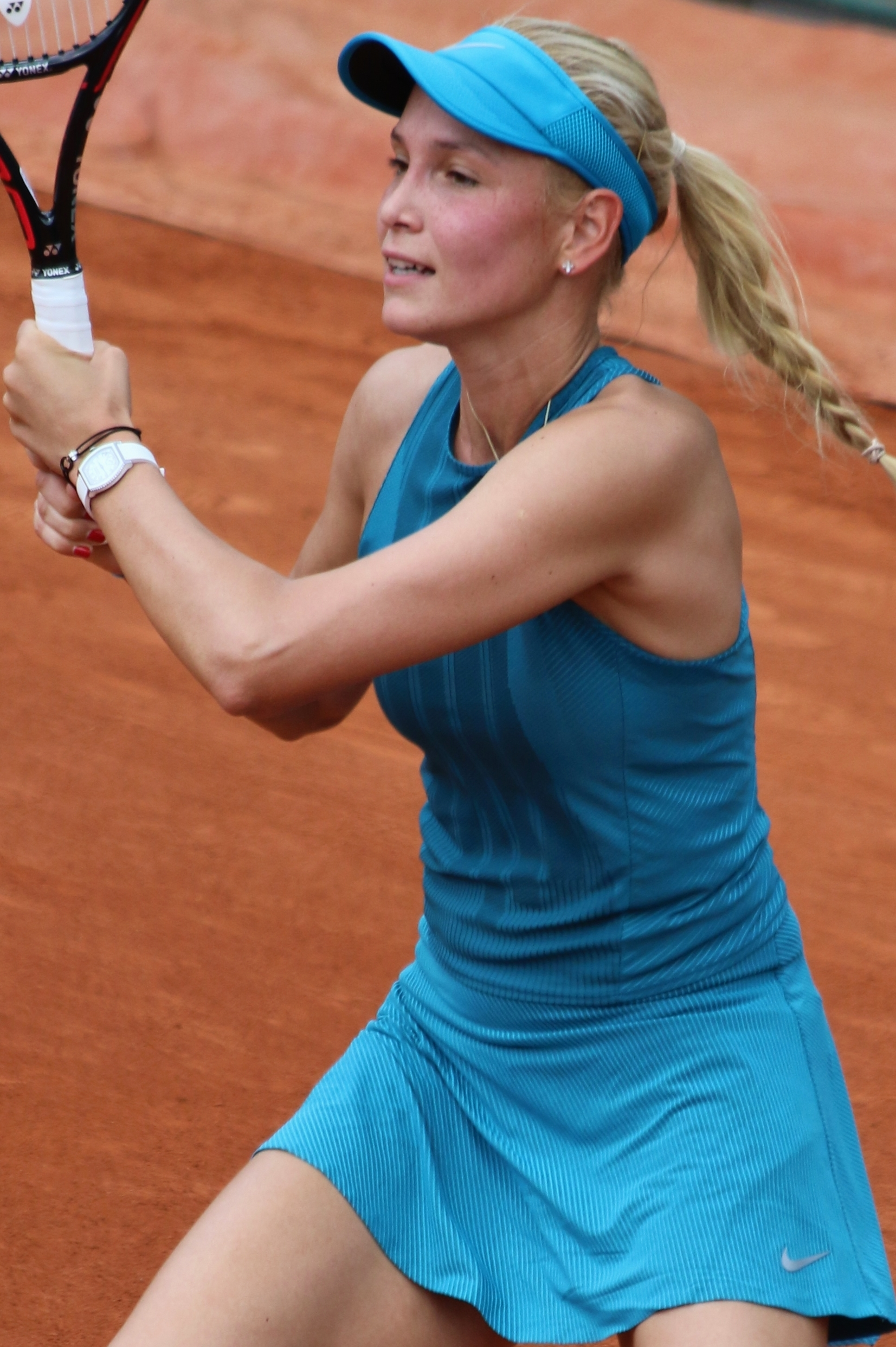 Vekic RG18 (13)